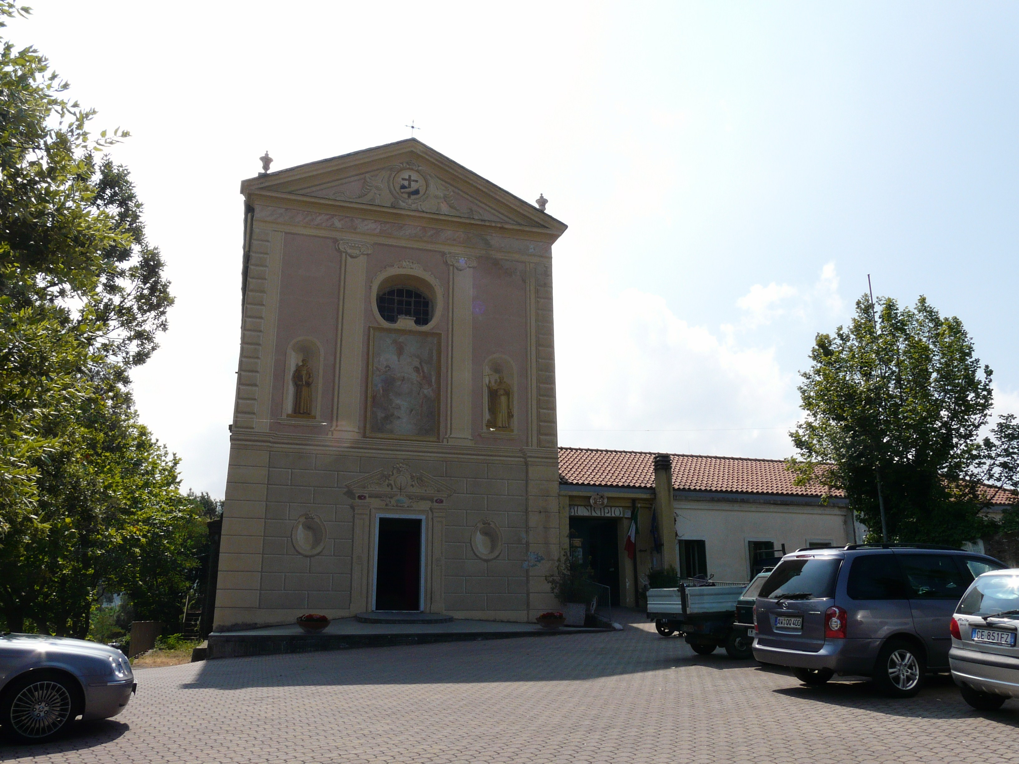 Chiesa di Sant'Antonio di Perinaldo, Liguria, Italia